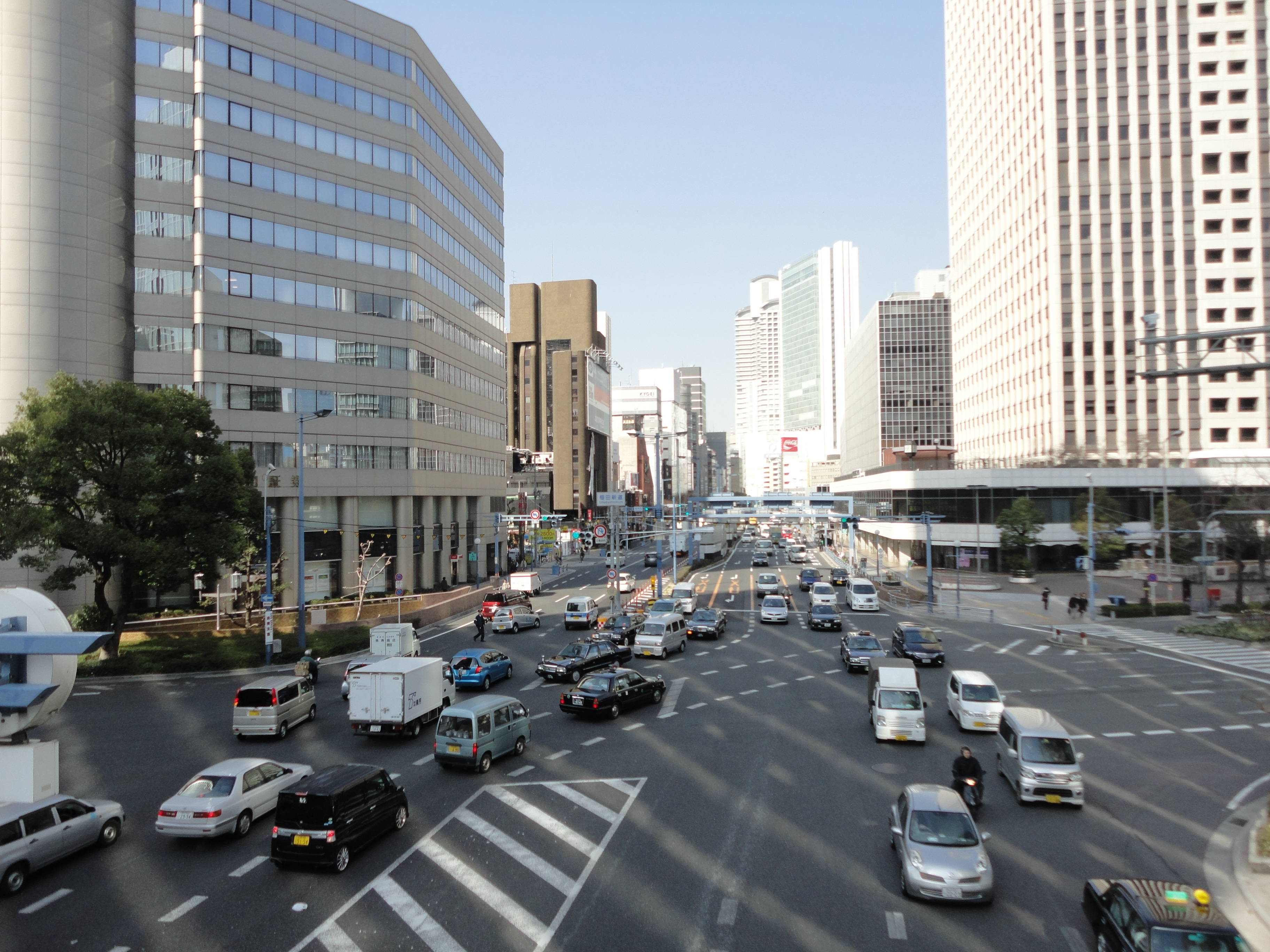 大阪市